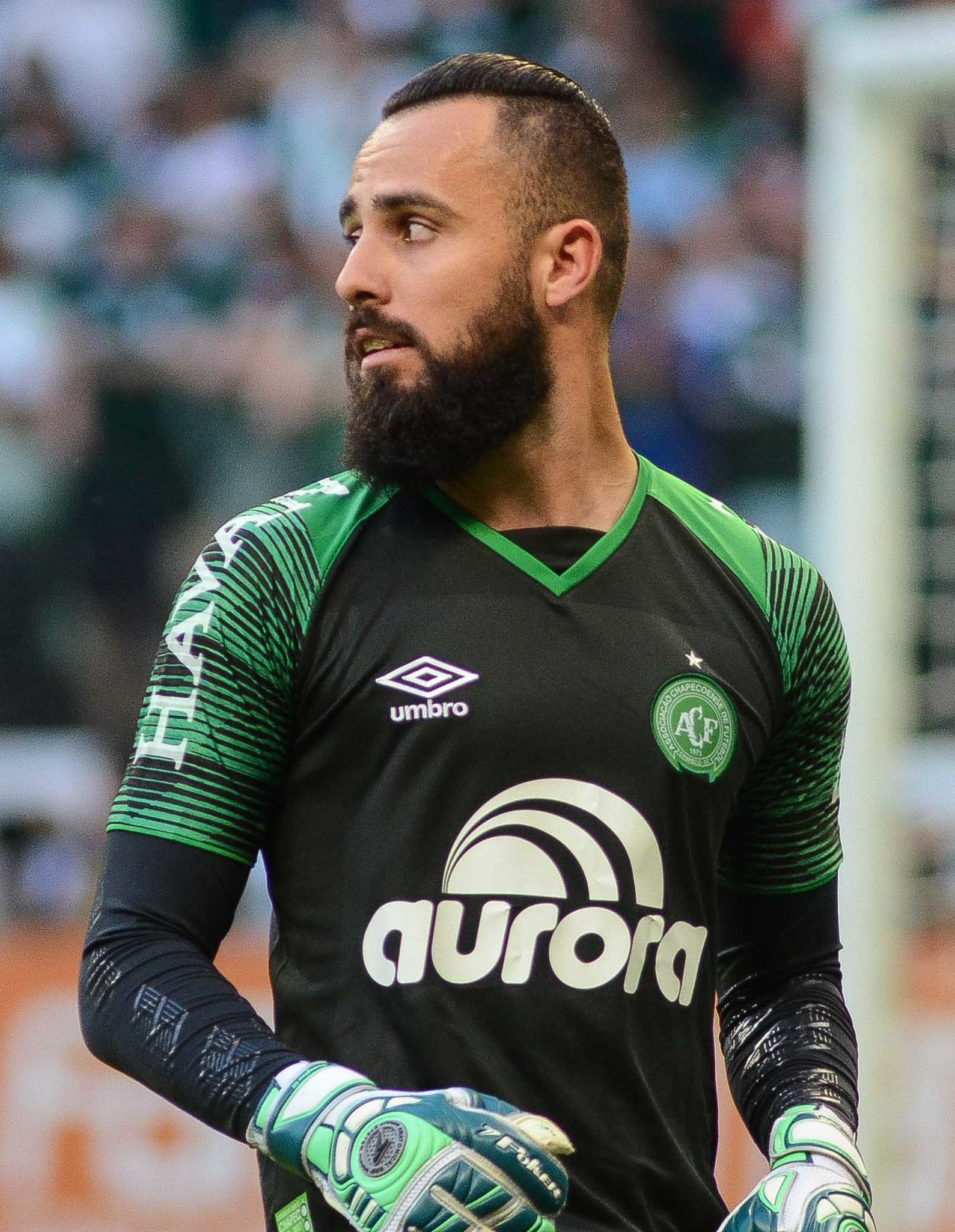 Players of Associação Chapecoense de Futebol